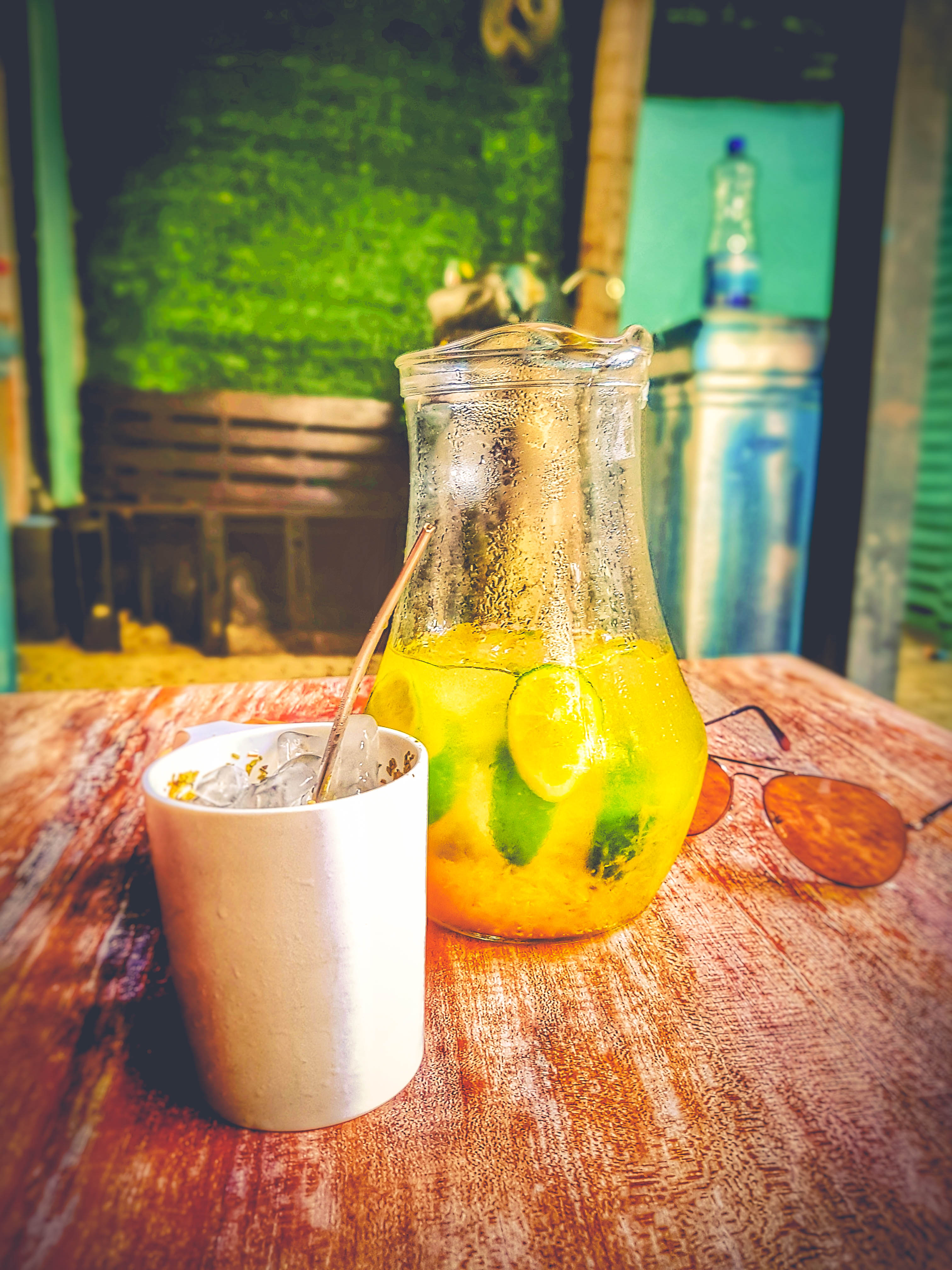 Tereré - infusión